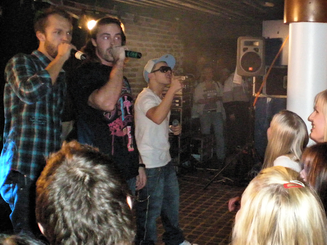 Kapasiteettiyksikkö @ Bepop, Kajaani '08